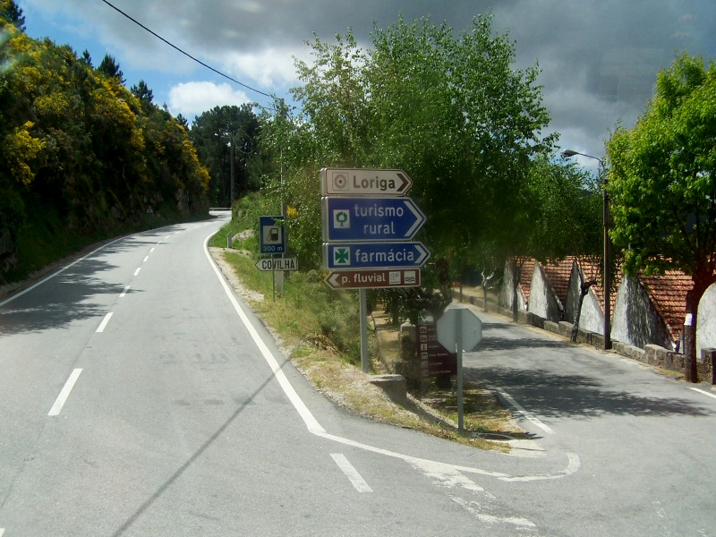 Entrada de Loriga